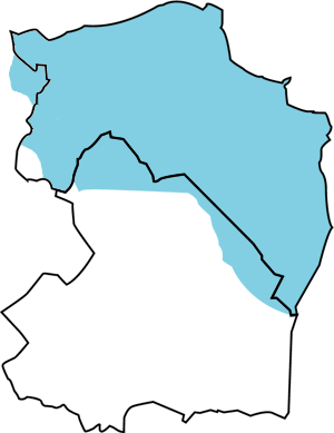 Verbeterde versie van Afbeelding:Groningen_in_kaart.png